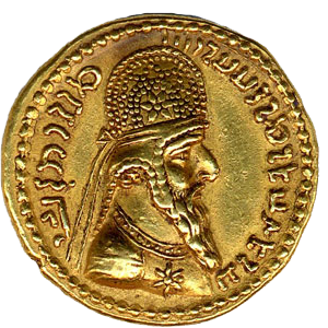 سکهٔ اردشیر بابکان